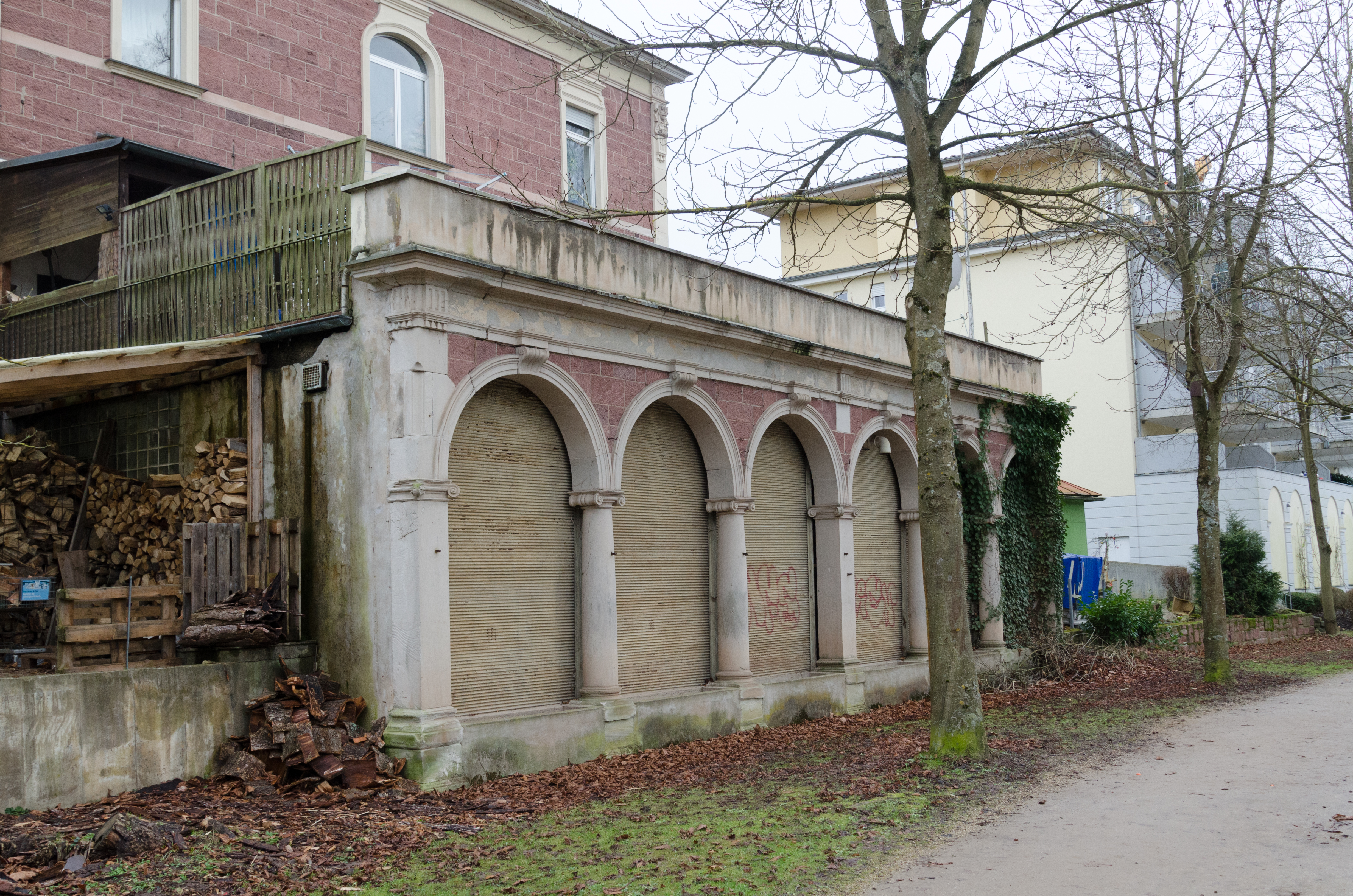 Bad Kissingen, Salinenstraße 37, 0045